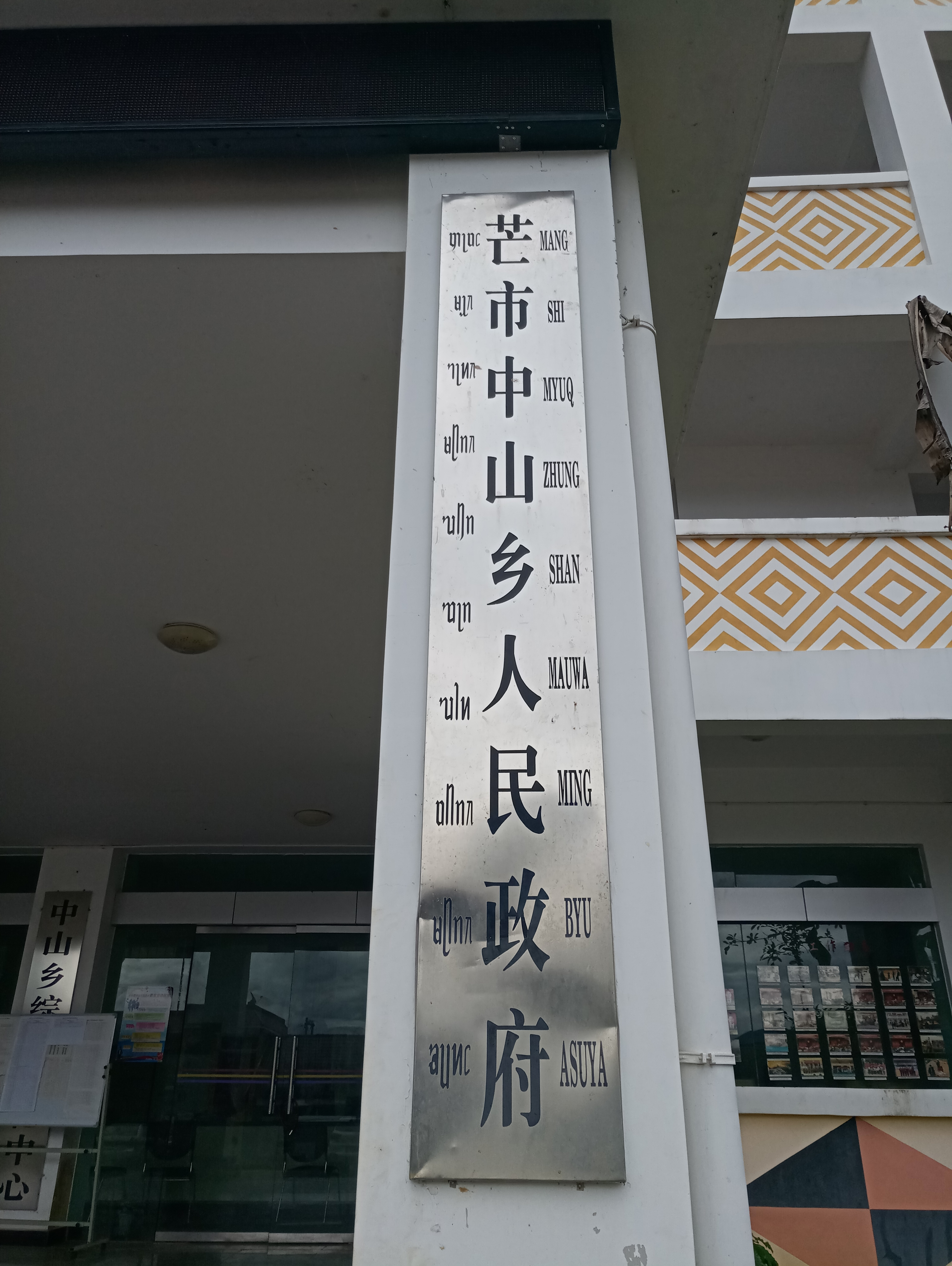 中山乡人民政府牌匾